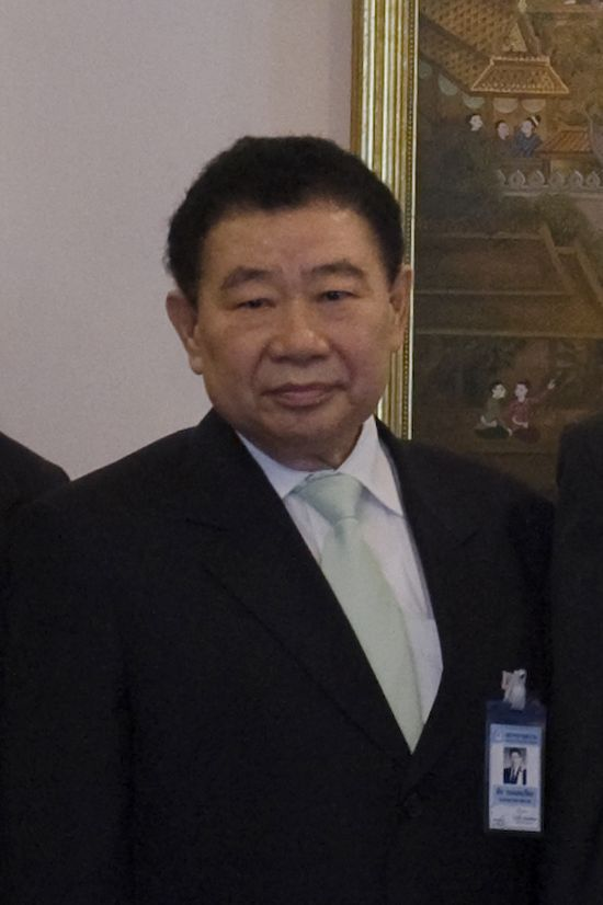 นายสัก กอแสงเรือง นายกสภาทนายความ นำคณะกรรมการบริหารสภาทนายความ เข้าพบนายกรัฐมนตรี เพื่อหารืองานช่วยเหลือประชาชนทางกฎหมายและชี้แจงแนวนโยบายการบริหารงาน ณ ห้องสีม่วง ตึกไทยคู่ฟ้า ทำเนียบรัฐบาล วันพุธ ที่ 7 กรกฏาคม พ.ศ. 2553 (Photographer attached to the Prime Minister of the Kingdom of Thailand : Peerapat Wimolrungkarat / พีรพัฒน์ วิมลรังครัตน์)